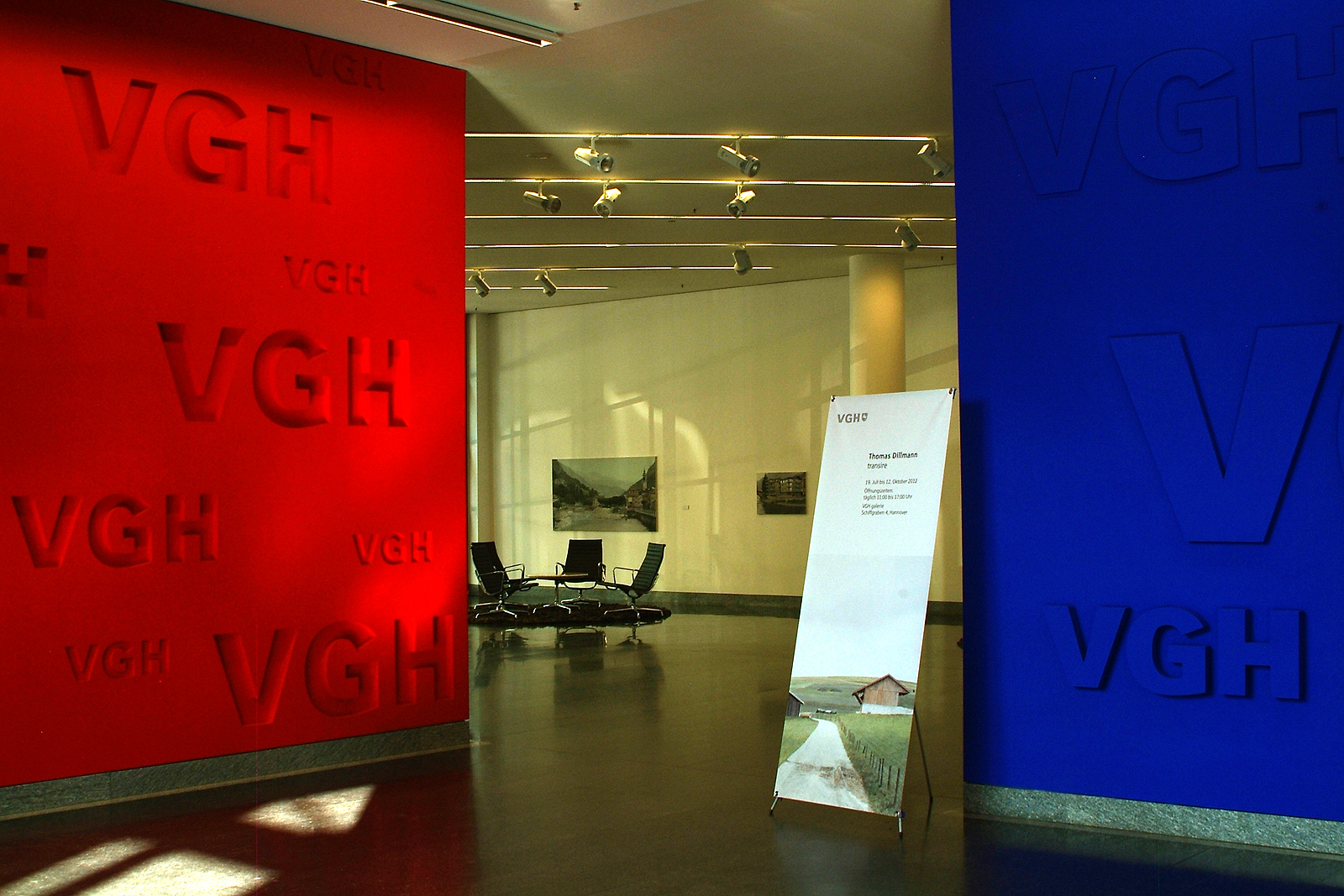 Durchgang zur Ausstellung transire von Thomas Dillmann in der offenen VGH Galerie; VGH Versicherungen, Schiffgraben 4, Hannover, Ausstellung transire vom 19.7. bis 12.10.2012 ...